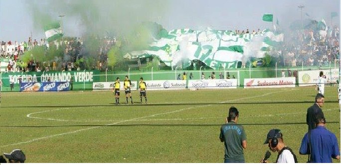 A maior torcida do interior de Goiás